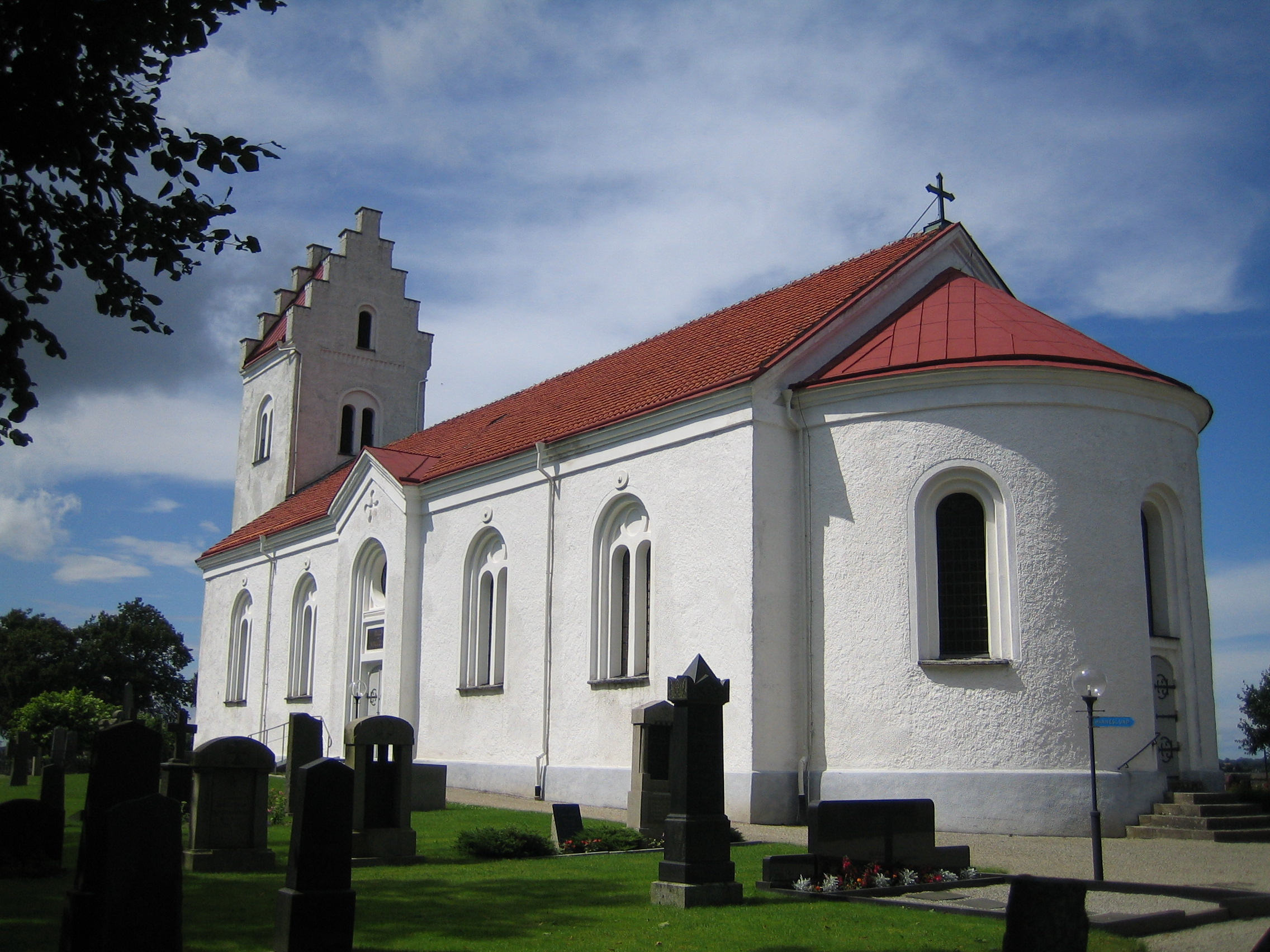 Stiby kyrka.